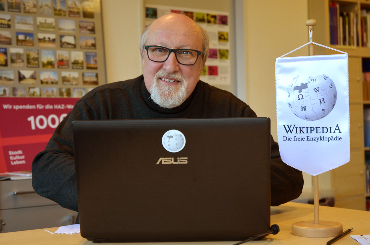 Der Pädagoge und ehemalige Schulleiter des Kurt-Schwitters-Gymnasiums Hannover-Misburg, Winfried Baßmann am 5. Februar 2018 ...